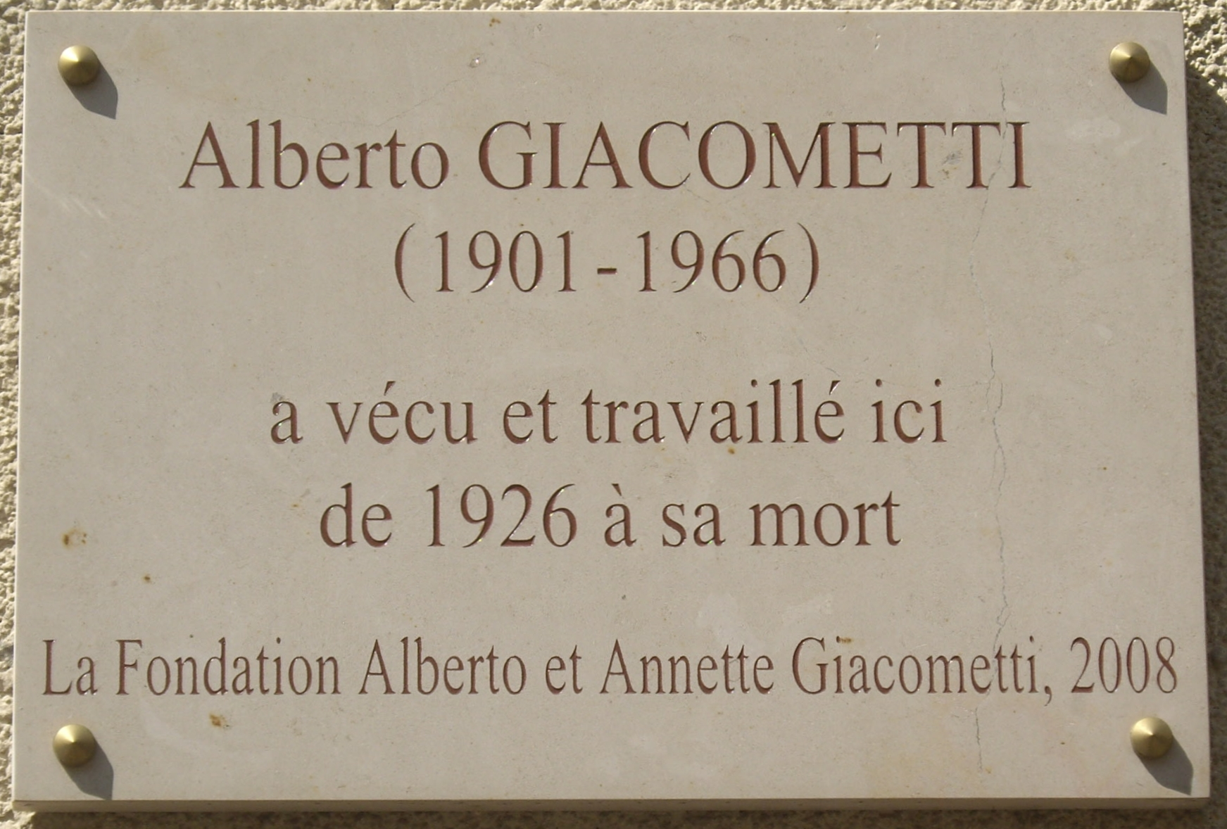 Plaque commémorative, 46 rue Hippolyte-Maindron, Paris 14e. « Alberto Giacometti (1901-1966) a vécu et travaillé ici de 1926 à sa mort. — La Fondation Alberto et Annette Giacometti, 2008. »